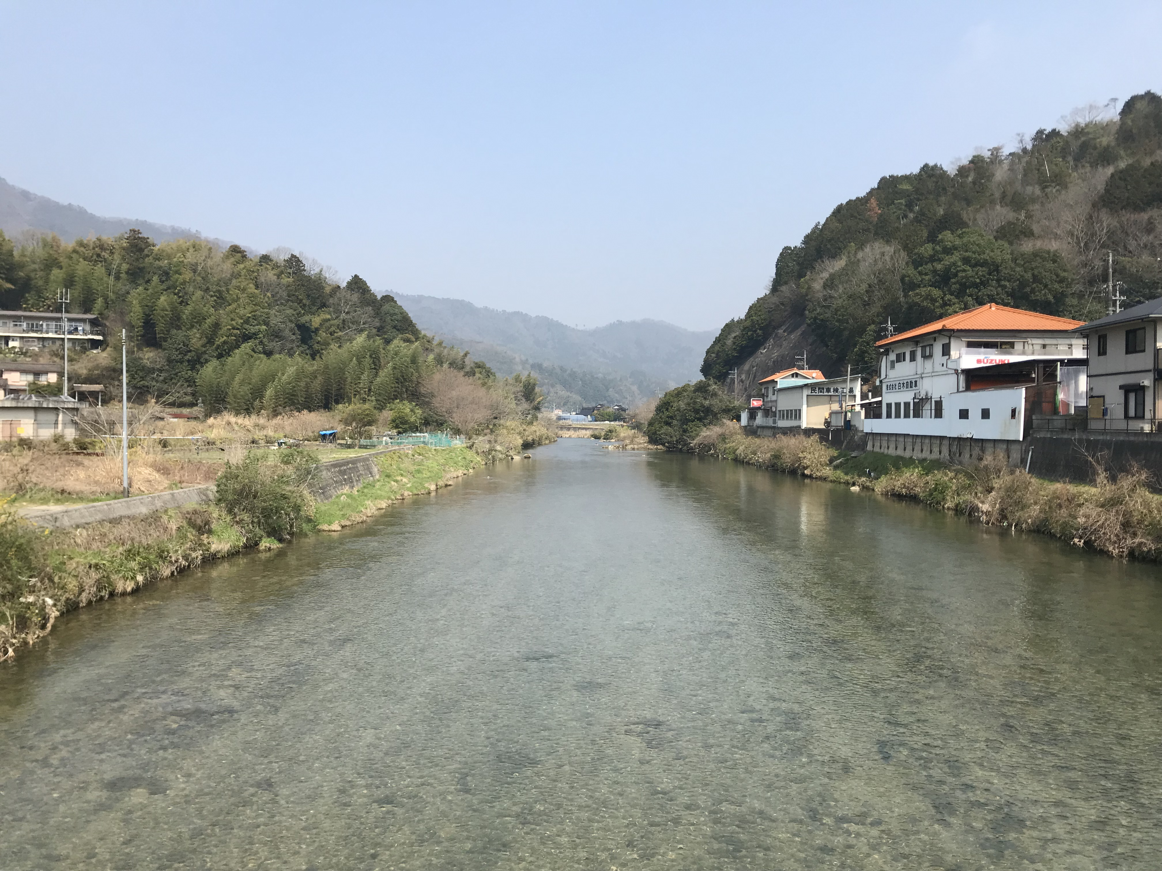 柏木橋より望む三篠川(上流側)